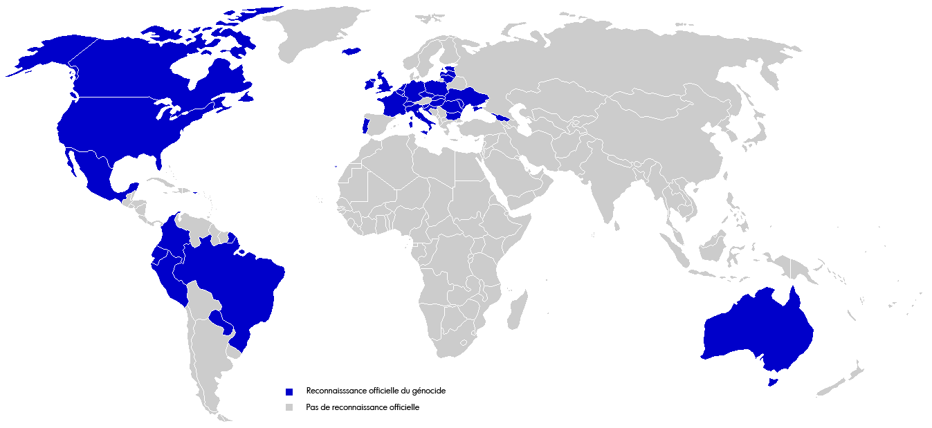 Pays qui reconnaissent officiellement l'Holodomor comme un acte de génocide